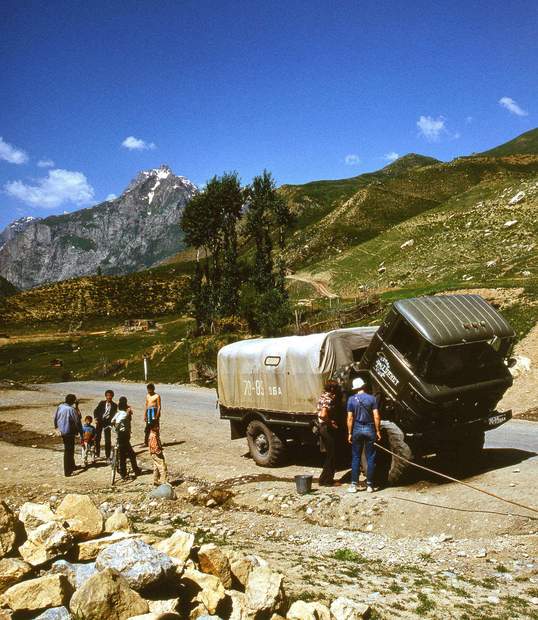 Central Asia, Region Pamir Alai, Fan Mountains tajikistan map